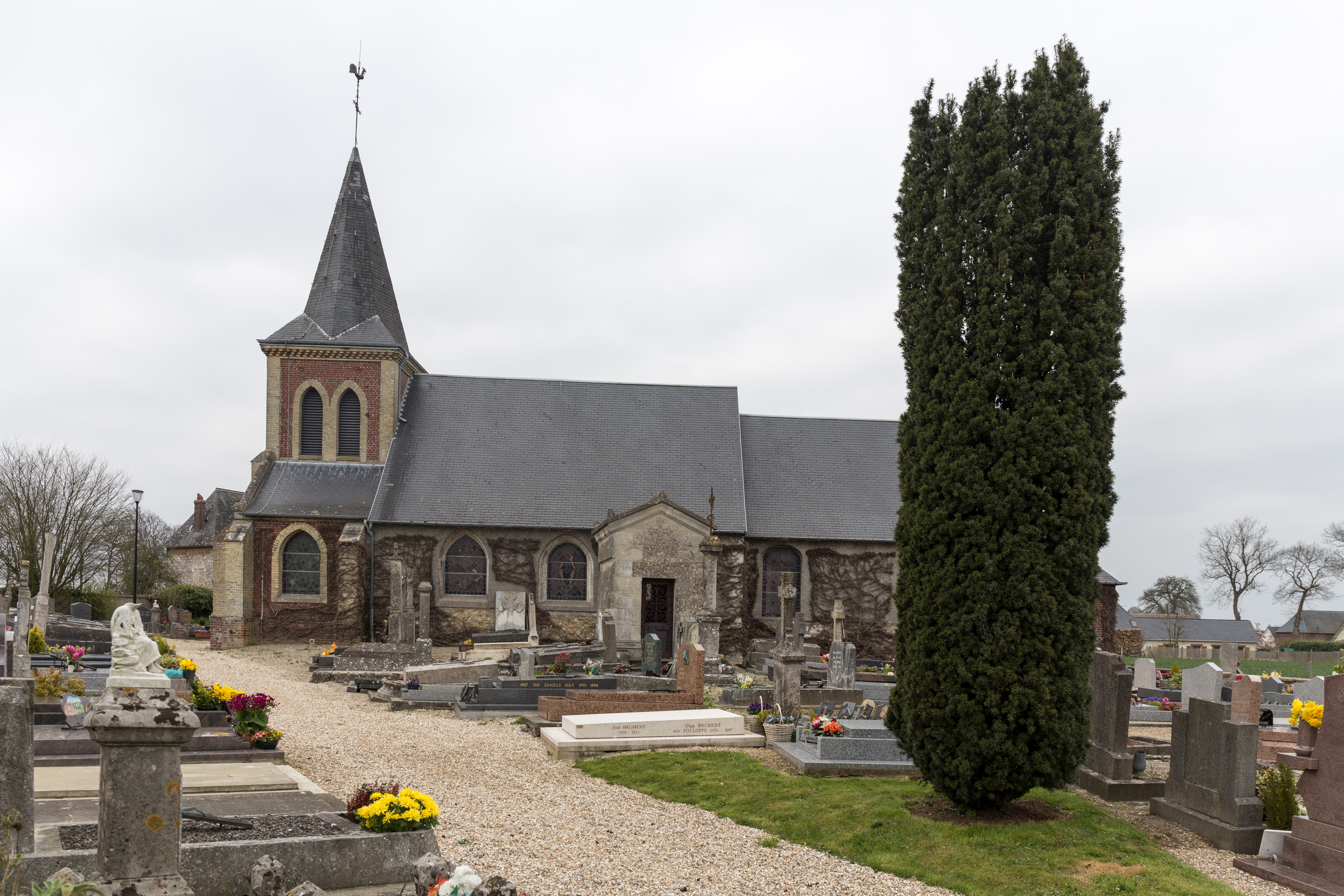 Église Saint-Amand d'Anquetierville.